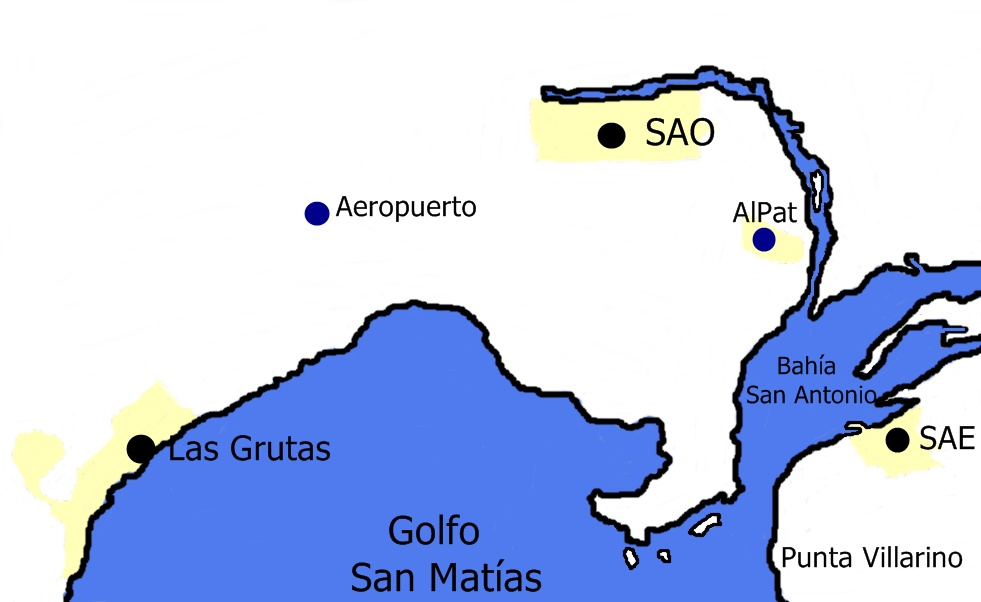 Mapa hecho por mi del la región de San Antonio, Río Negro